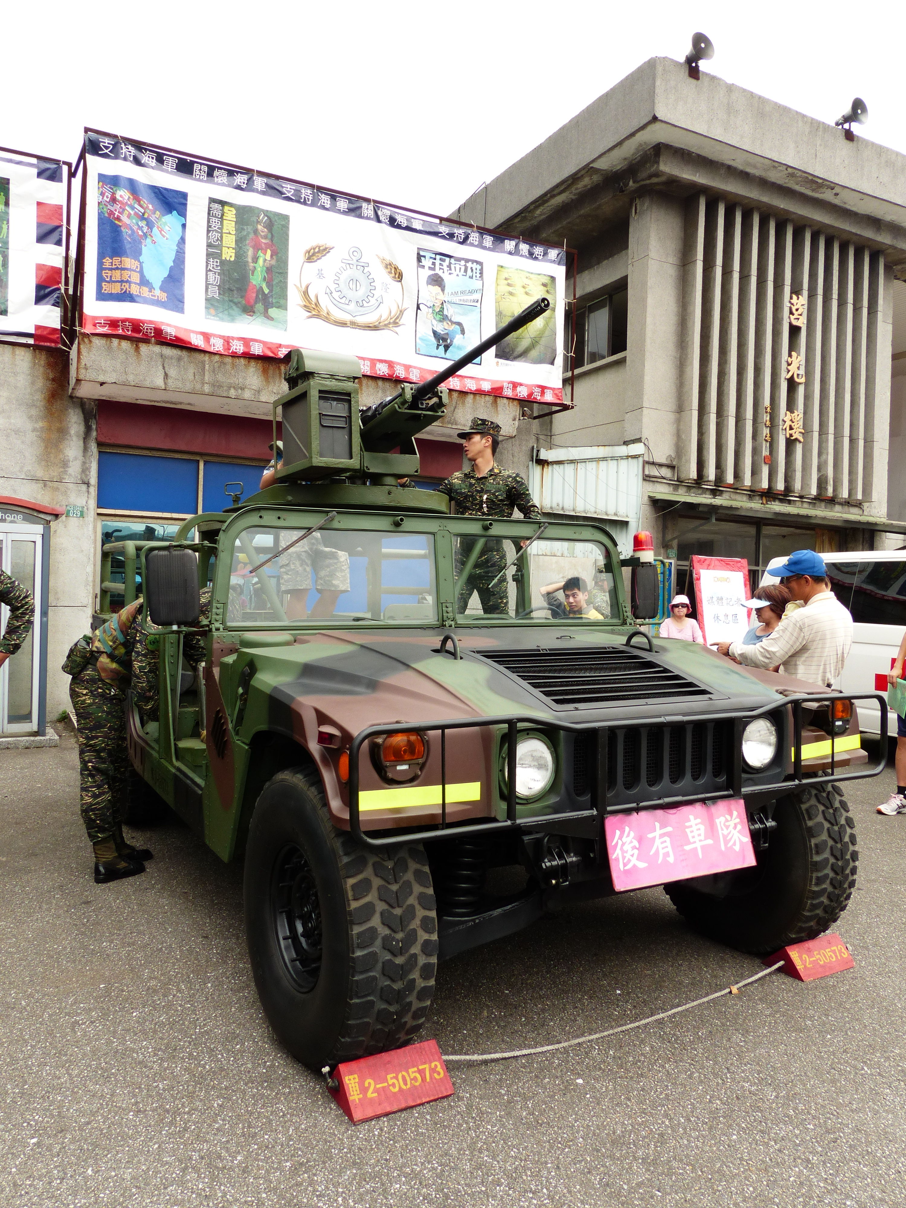 基隆海軍碼頭展示海軍陸戰隊搭載T-75M 20mm機關砲的悍馬車。